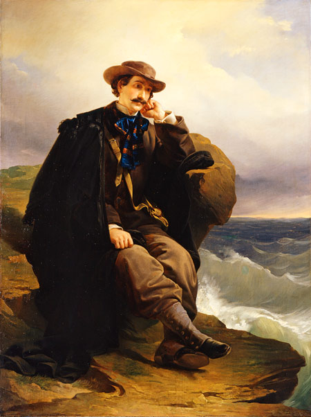 Ritratto di Aleardo Aleardi, olio su tela, cm 177,8 x 132,8, collezione privata